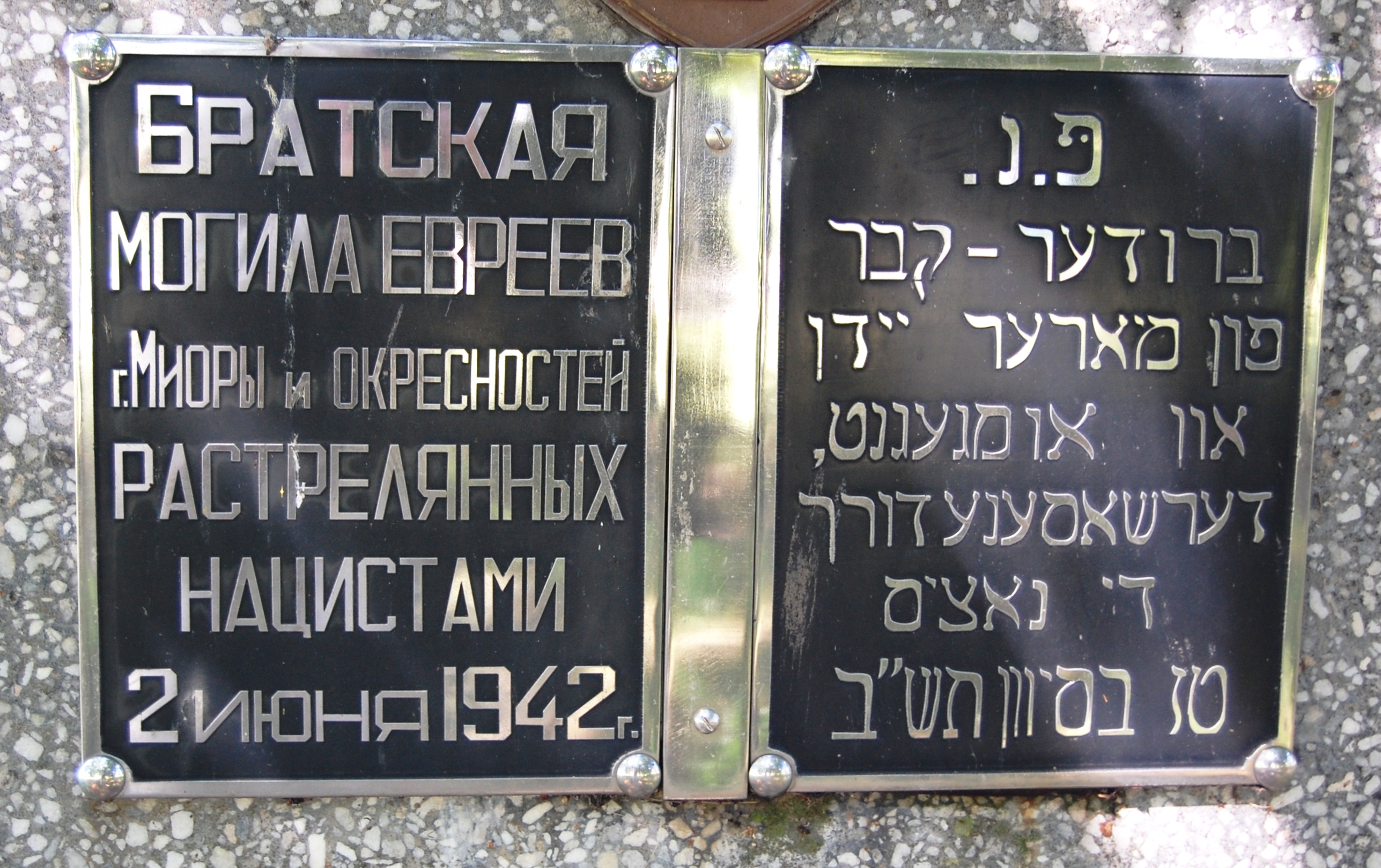 Памятник евреям в Миорах - жертвам нацистов и их пособников.